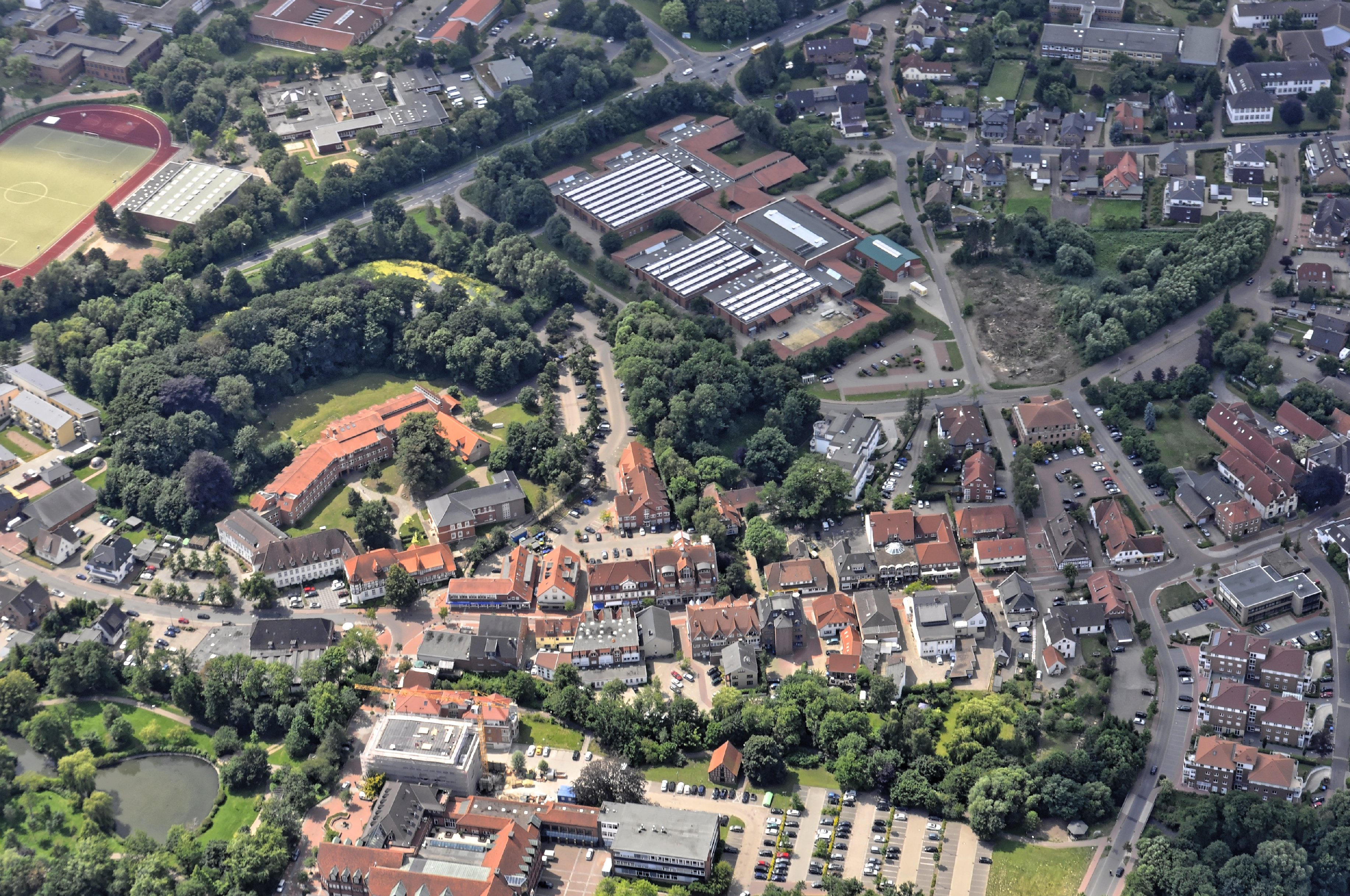 Bilder vom Flug Nordholz-Hammelburg 2015: Blick von Osten auf Syke; in der Bildmitte oben die hellen Dächer der Gebäude der Berufsbildenden Schule Syke; Bildmitte links mit roten Dach der alte Amtshof; vorn links der Mühlenteich.